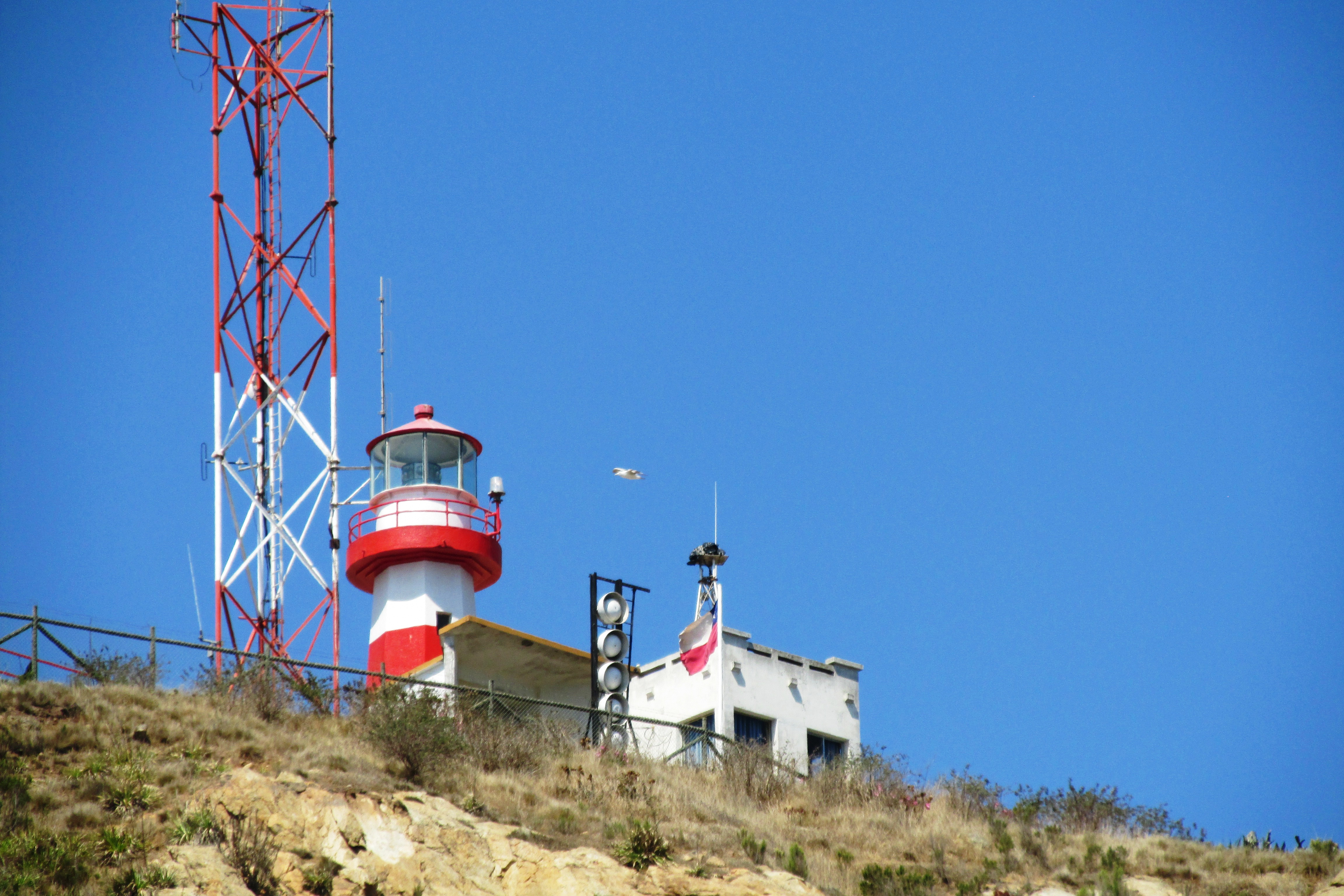 Vista Faro Panul en san Antonio región de Valparaiso